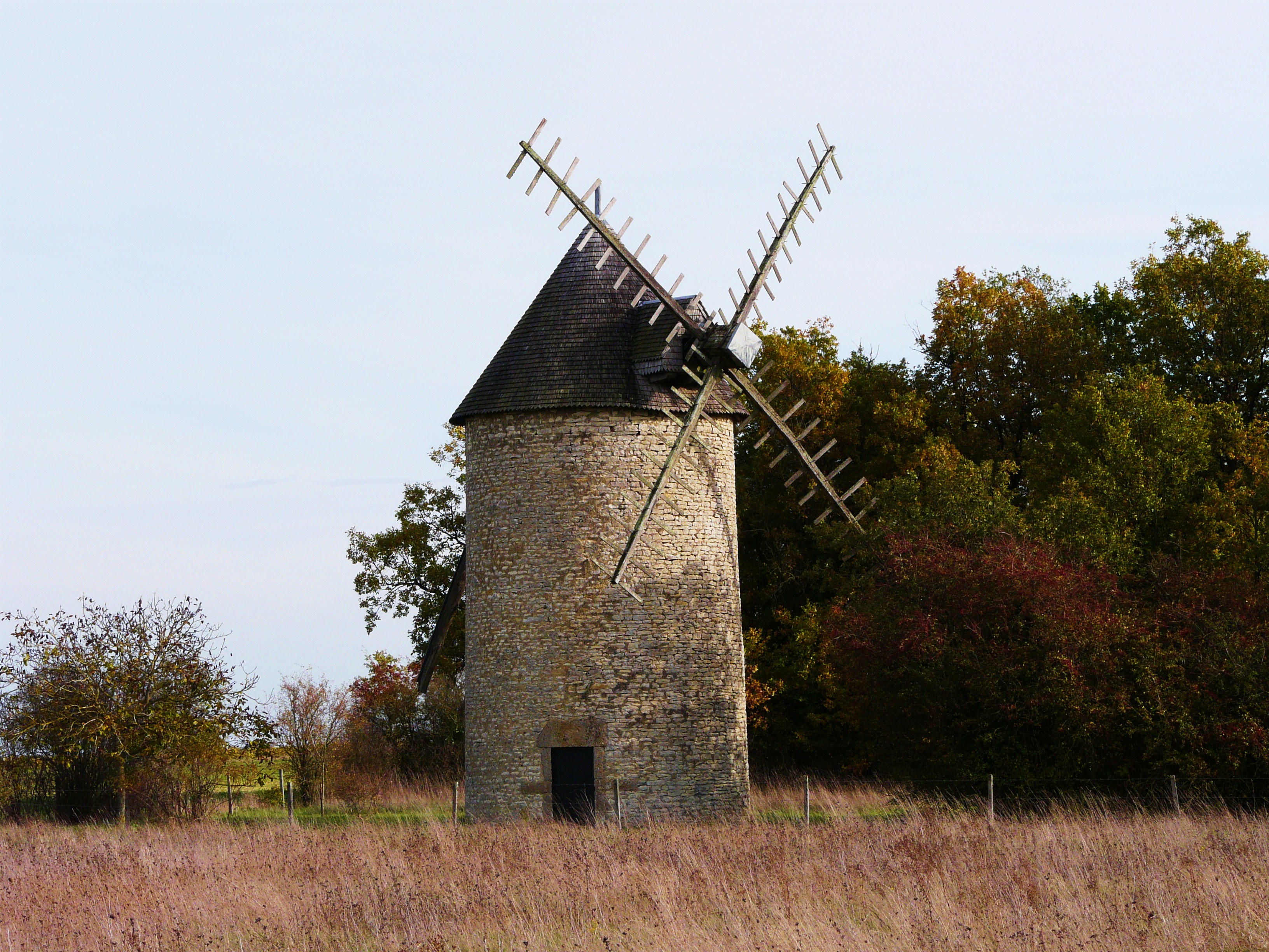 Le moulin de Bellien, Mazeuil, Vienne, France